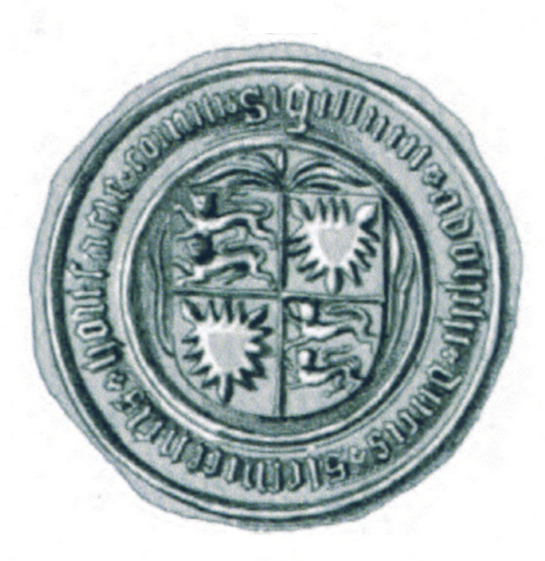 Siegel des Adolf VIII. von Holstein (* 1401; † 4. Dezember 1459) aus dem Geschlecht der Grafen von Schauenburg und Holstein, Graf von Holstein von 1427 bis 1459 sowie ab 1440 als Adolf I. Herzog von Schleswig. Seine erste Frau war Mathilde, Tochter eines Grafen von Anhalt, seine zweite Frau war Margaretha Gräfin von Hohnstein (1435-1496). Das Siegel stammt aus der Zeit um 1447.